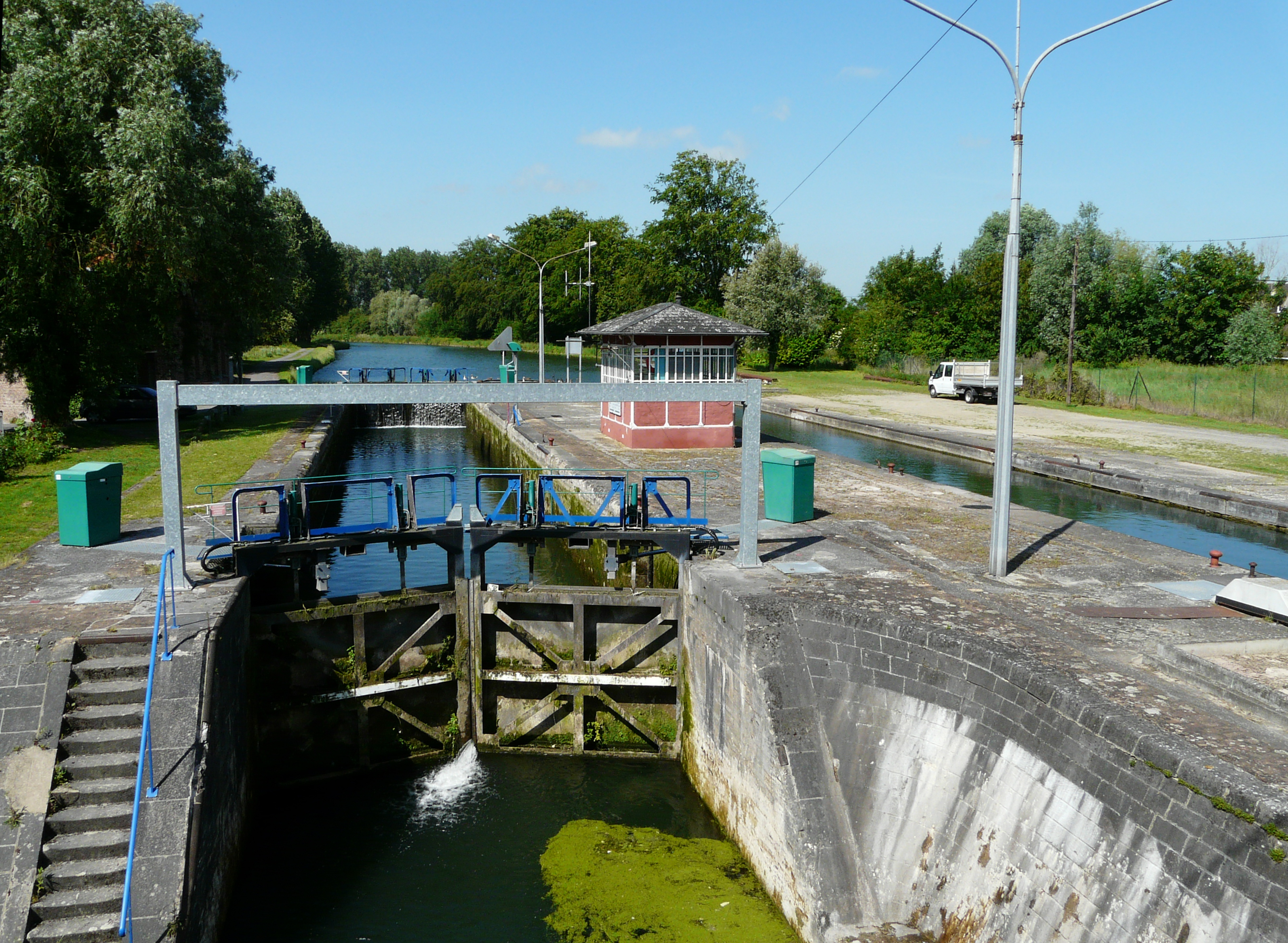 Écluse de Thun-l'Évêque sur le canal de l'Escaut